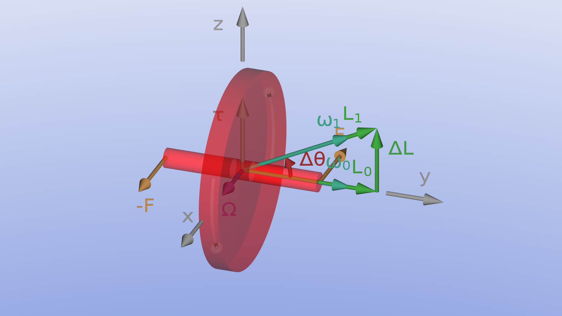 Gyroskop und Präzession